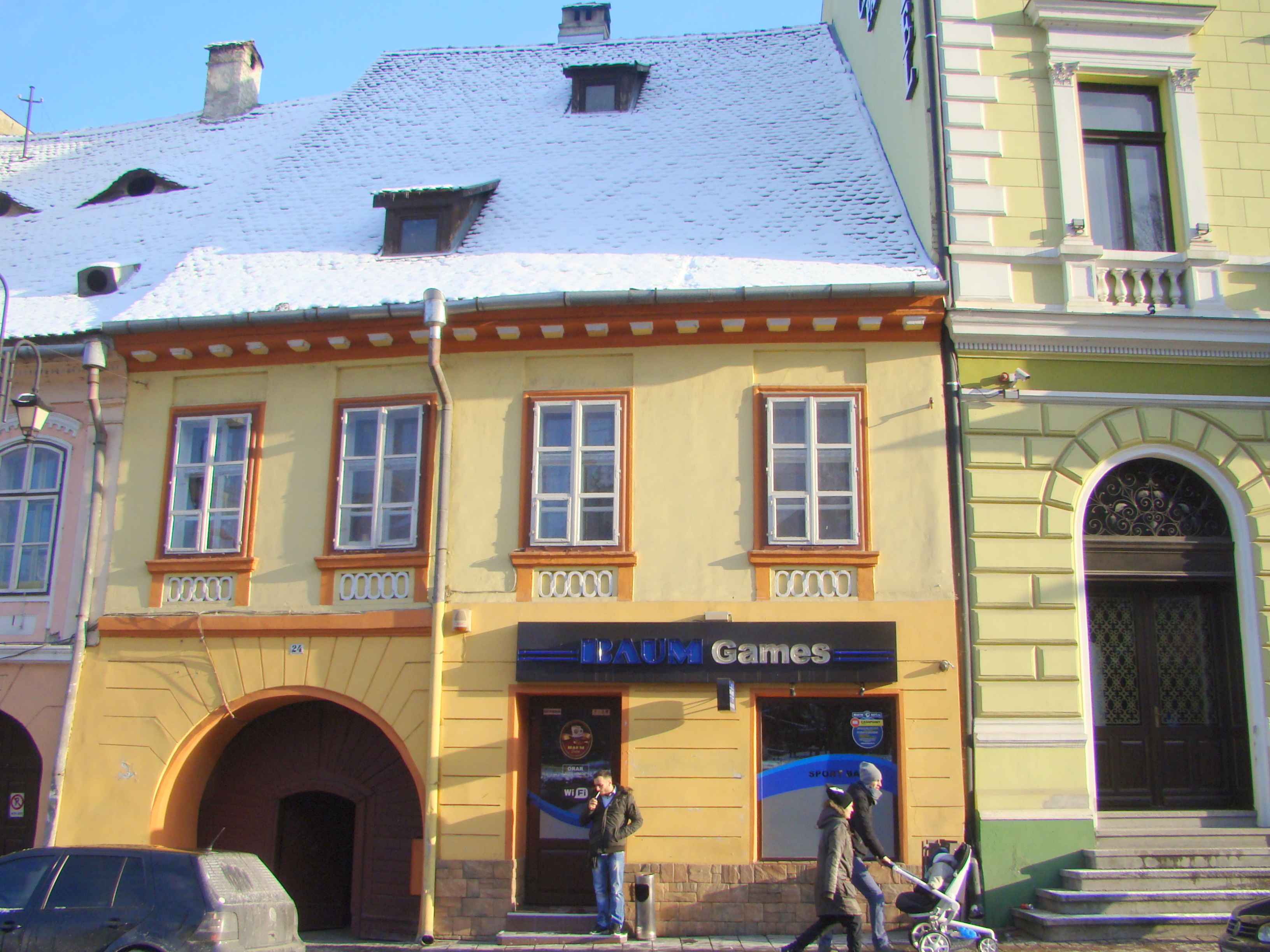 Casă, municipiul Sighișoara, Piața Oberth Hermann 24 sf. sec. XVIII,1800 - 1850